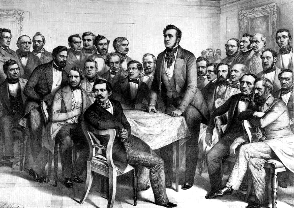 „Club des Casino“ Blatt 2, Lithographie, 41,9 x 55cm, um 1849, aus einer Folge von 3 Blättern „Zur Erinnerung an die Verfassung gebende deutsche Reichsversammlung des Jahres 1848“ von Friedrich Pecht, „Club des Casino“ Blatt 1, Lithographie, 41,9 x 55cm, um 1849, „Club des Augsburger Hofes“ Lithographie, 41,9 x 55cm, um 1849